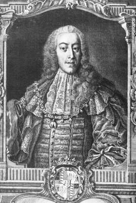 Johann Joseph Khevenhüller-Metsch (1706-1776), Diplomat, kaiserlicher Hofbeamter und erster Fürst Khevenhüller-Metsch